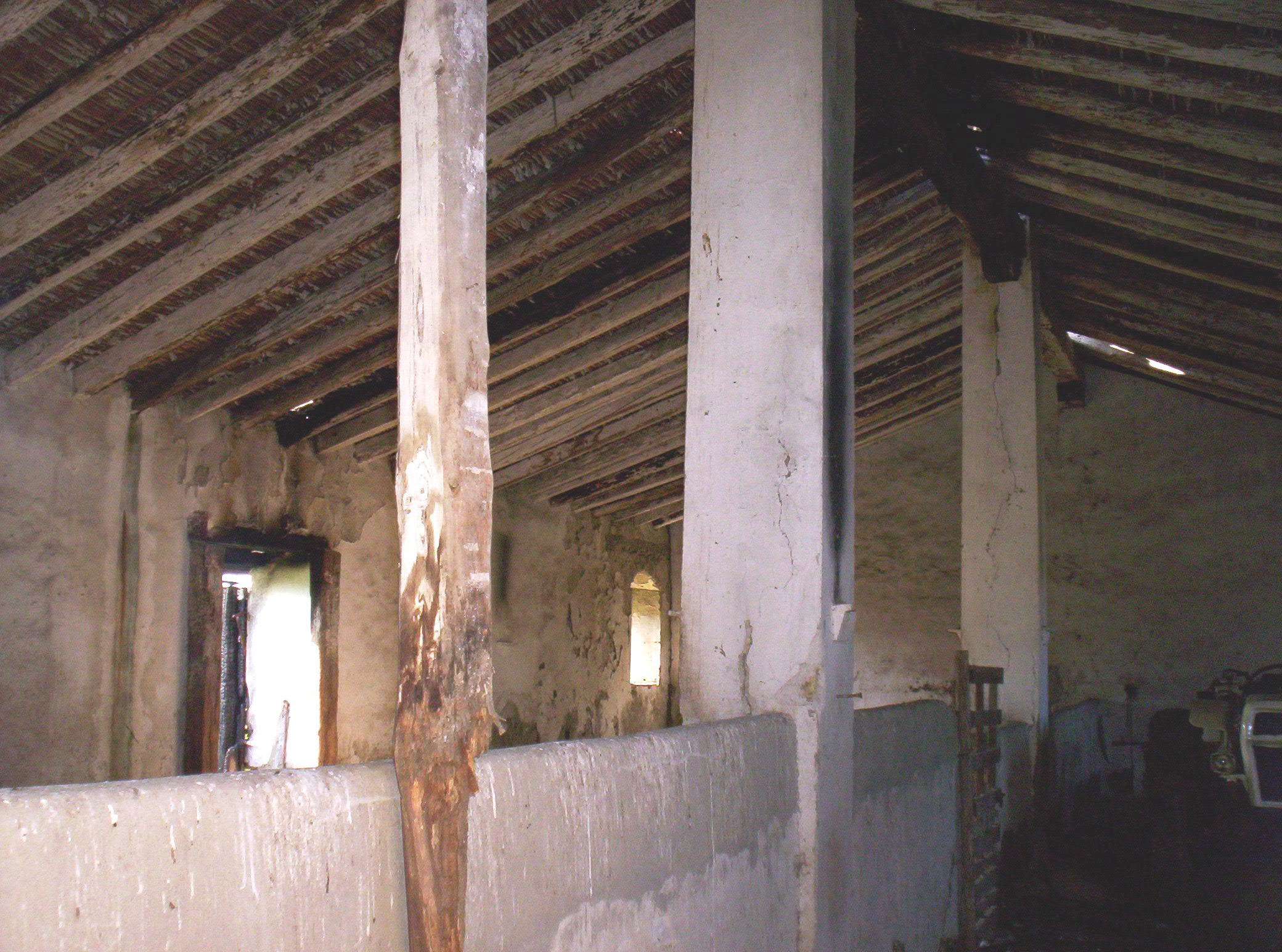 Autore e Fonte: Nicolò Fiorenza; Descrizione: interno del Fondaco Cuba verso la posta dei cavalli; Licenza d'uso